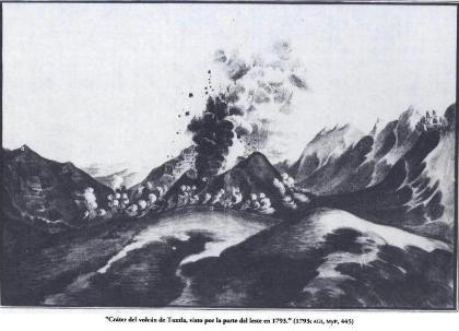 Erupcion Del Volcan San Martin Tuxtla